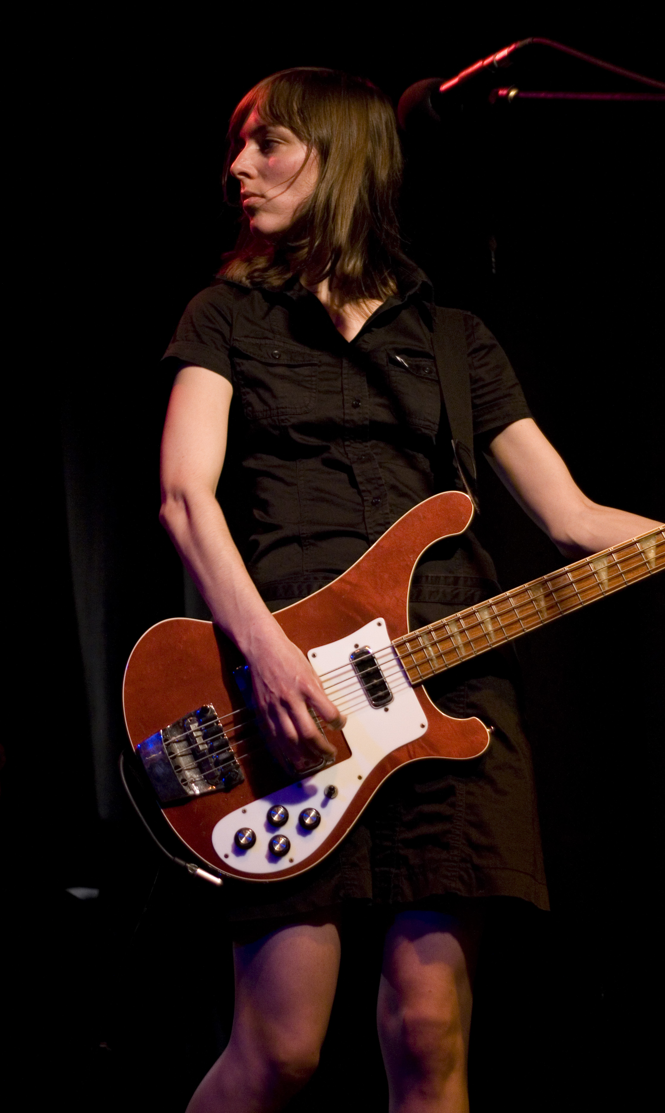 Bass Guitar Player Stefanie Schrank of Karpatenhund